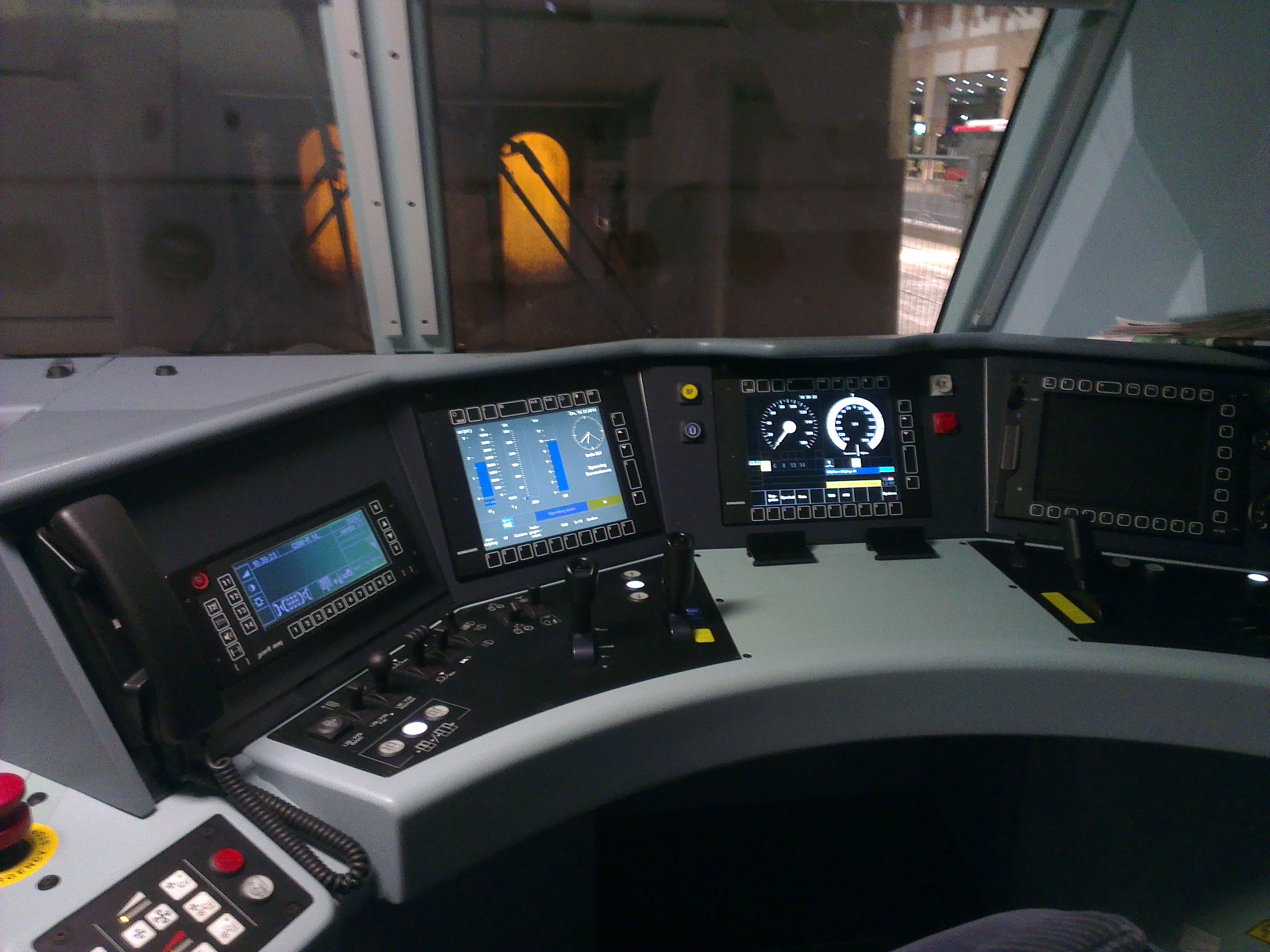 (E186 009) TRAXX-locomotief van binnen, toen deze stil stond op station Breda